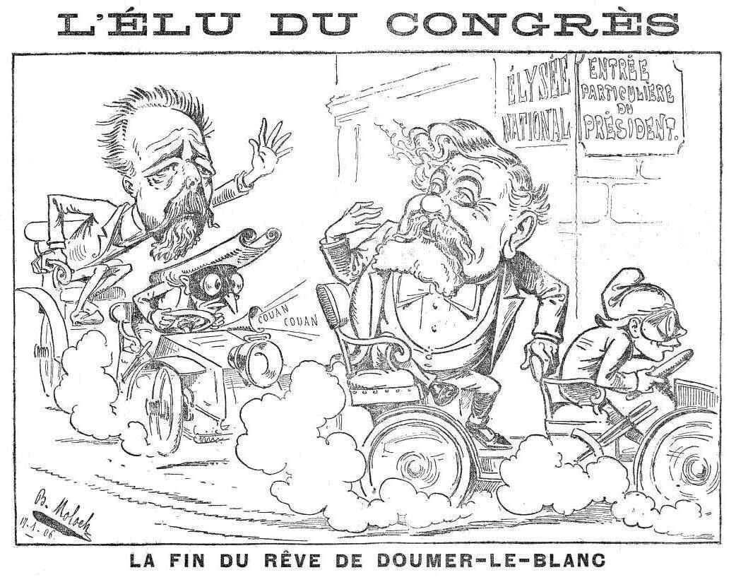 "L'élu du Congrès. La fin du rêve de Doumer-le-Blanc" (élection présidentielle française de 1906 : défaite de Paul Doumer contre Armand Fallières).